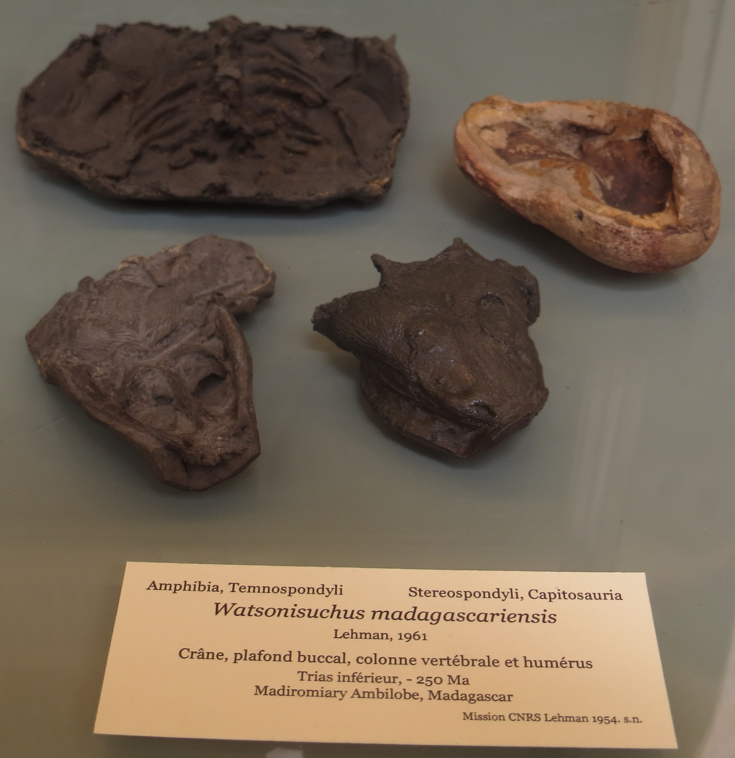 Edingerella fossils